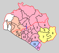 兵庫県加古郡の町村制時点の町村。